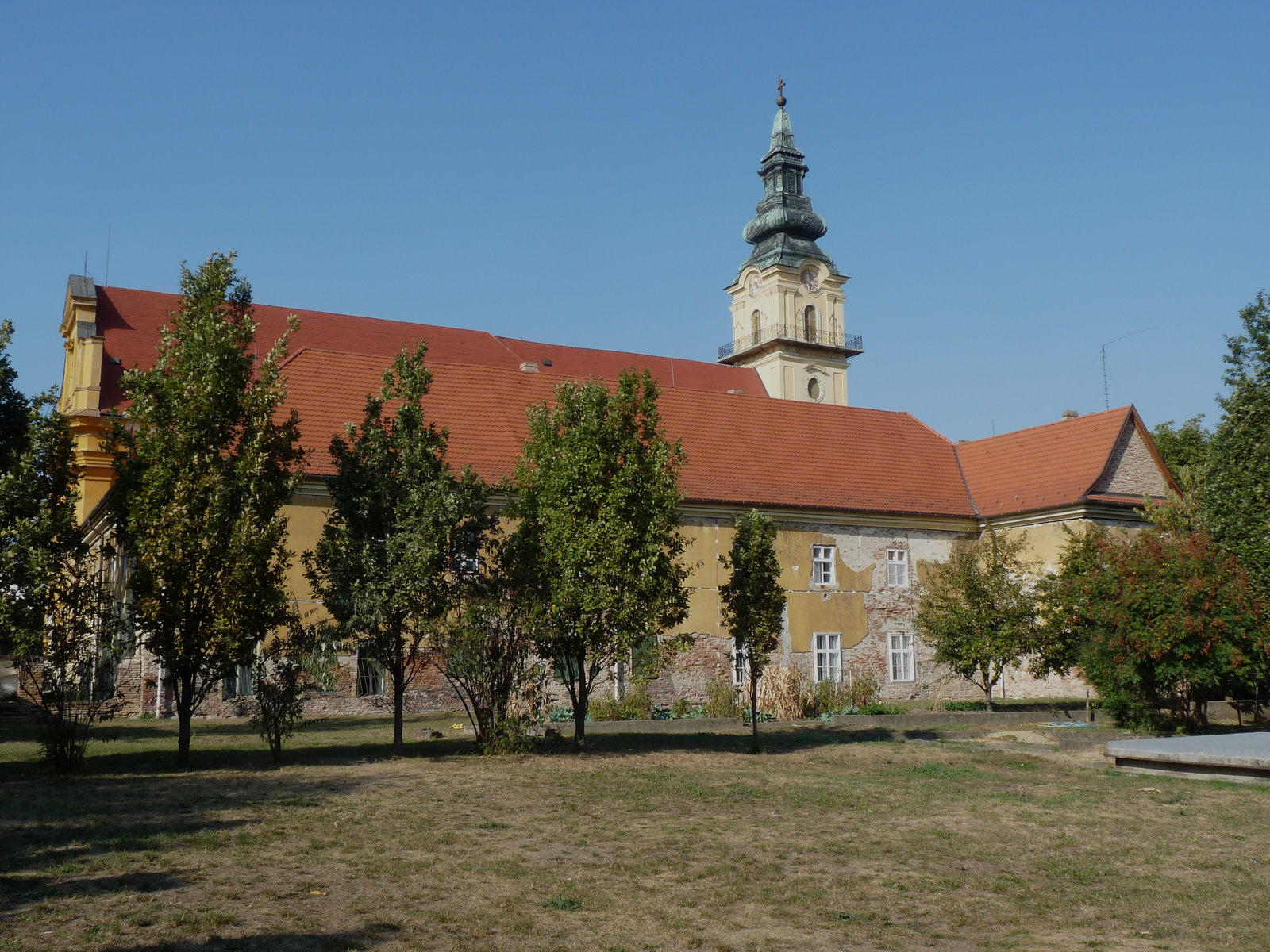 Ferences rendház (Szolnok, Templom utca 8.) This is a photo of a monument in Hungary. Identifier: 6057